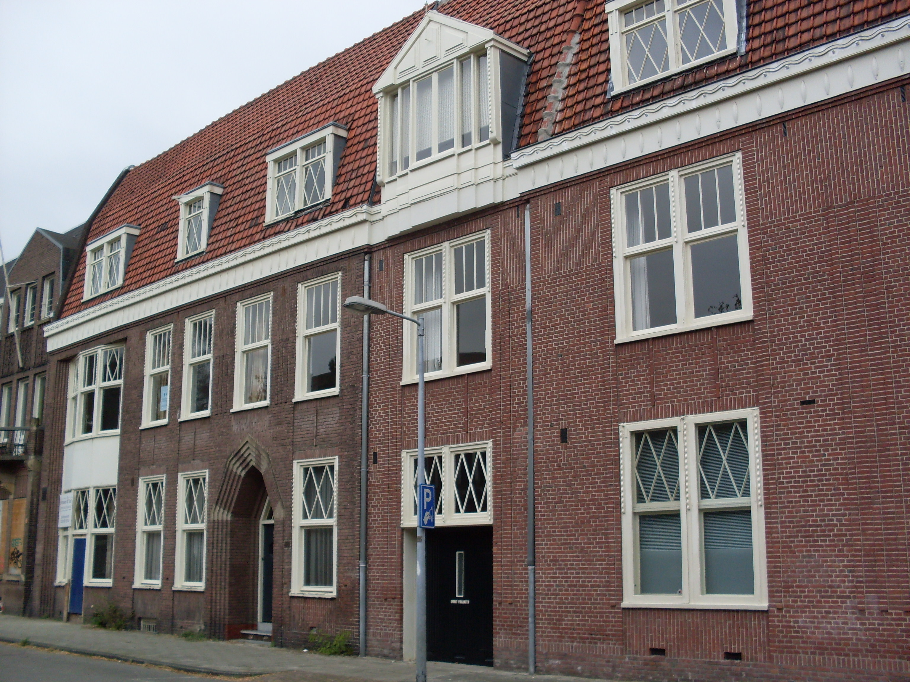 J.J. Viottastraat 34 Amsterdam.